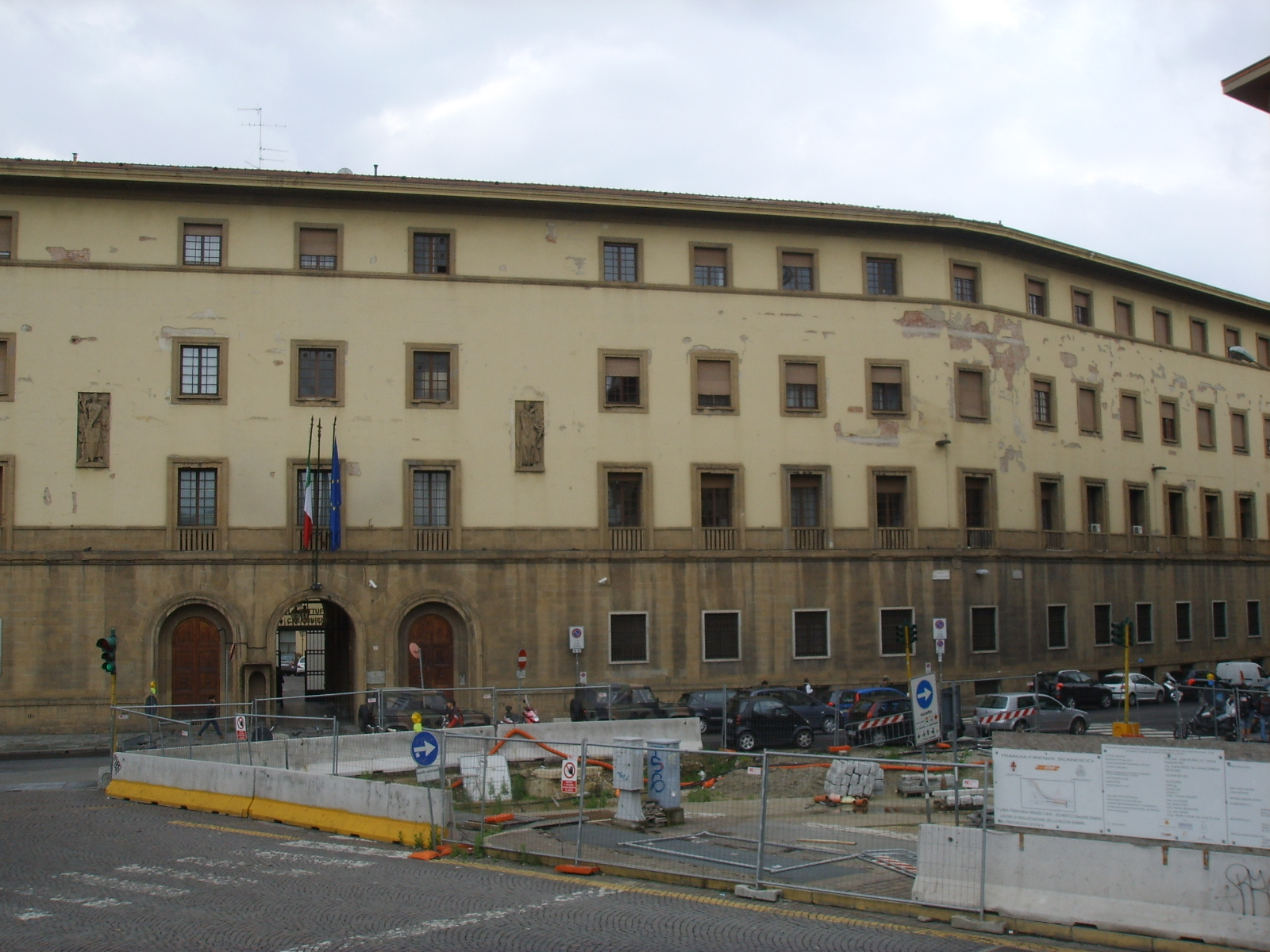 Caserma della Scuola allievi ufficiali dei Carabinieri